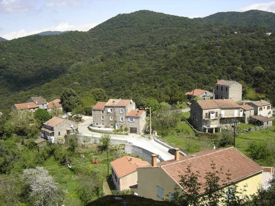 Hameau de Foce-di-Mela